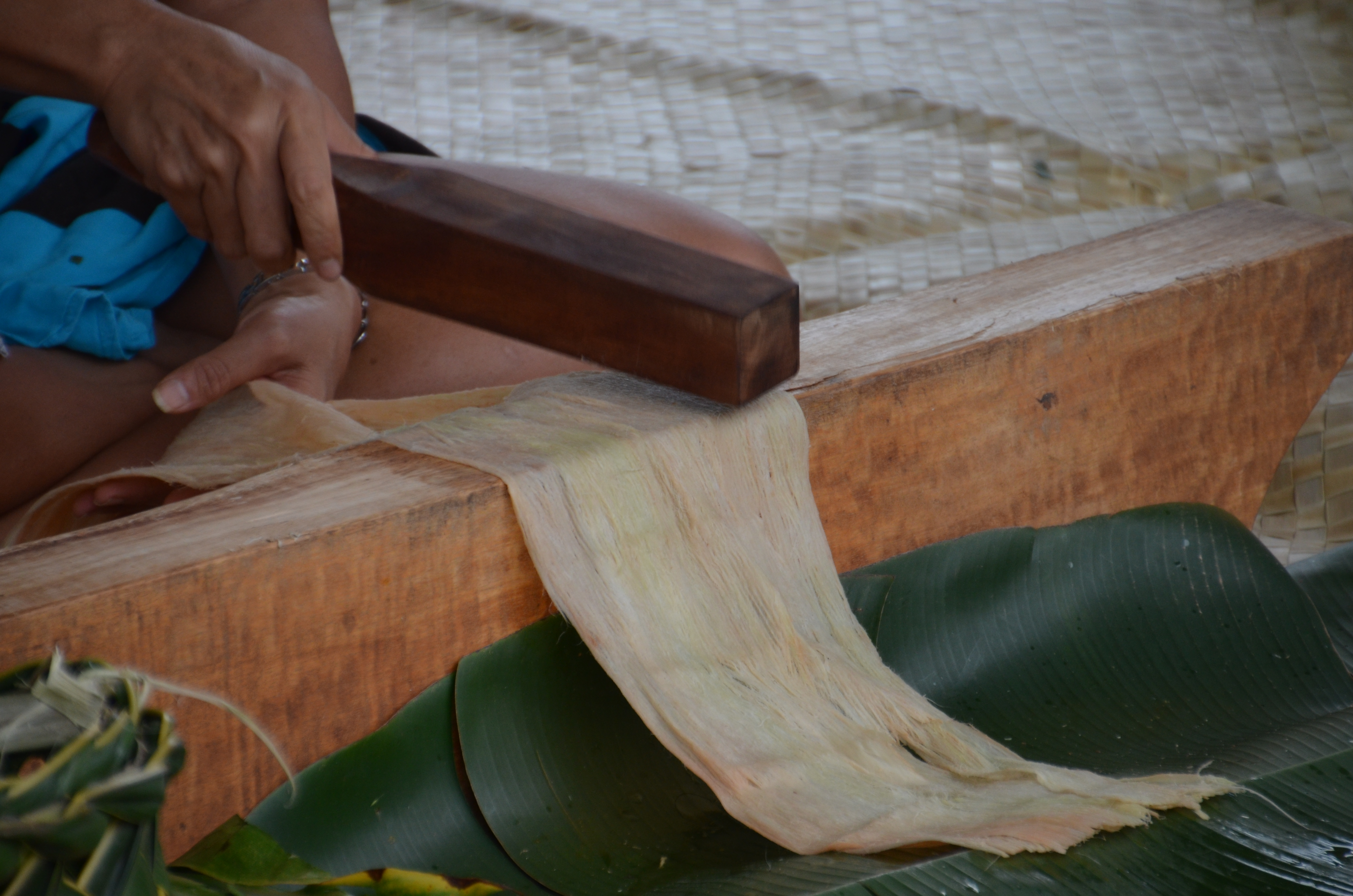 Kapa beating near Ahalanui (a0004770)